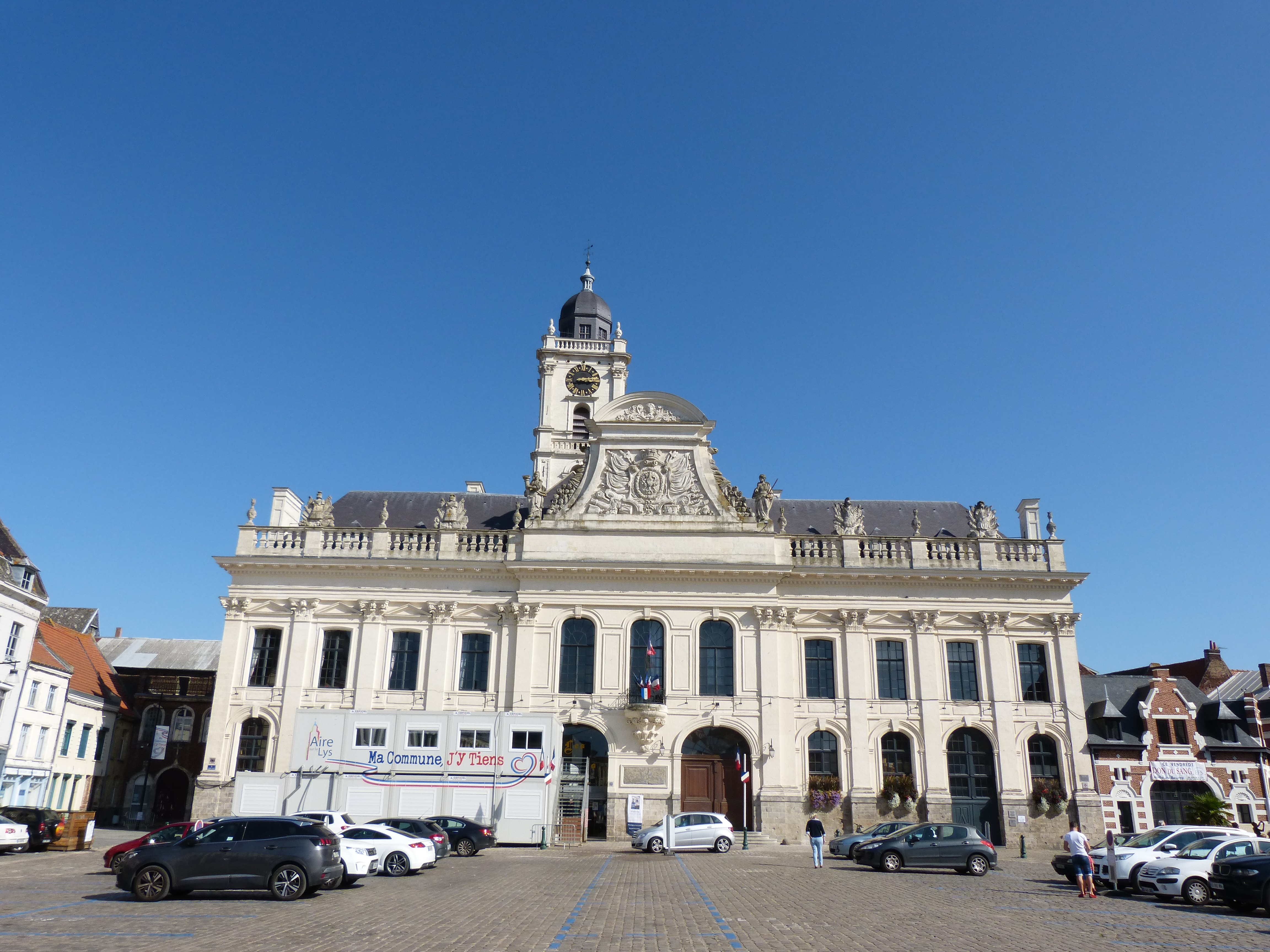 Hôtel de ville vu depuis la Grand' Place